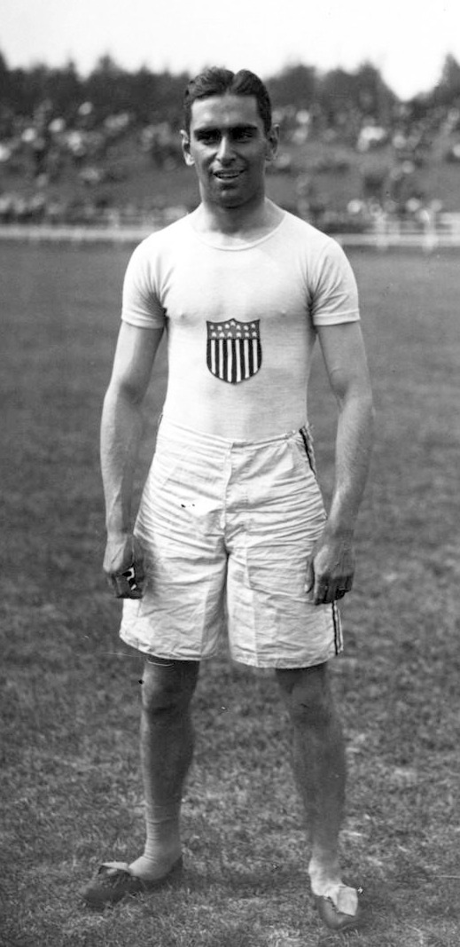 Reims, Alvah Meyer, américain, 100 et 200 mètres